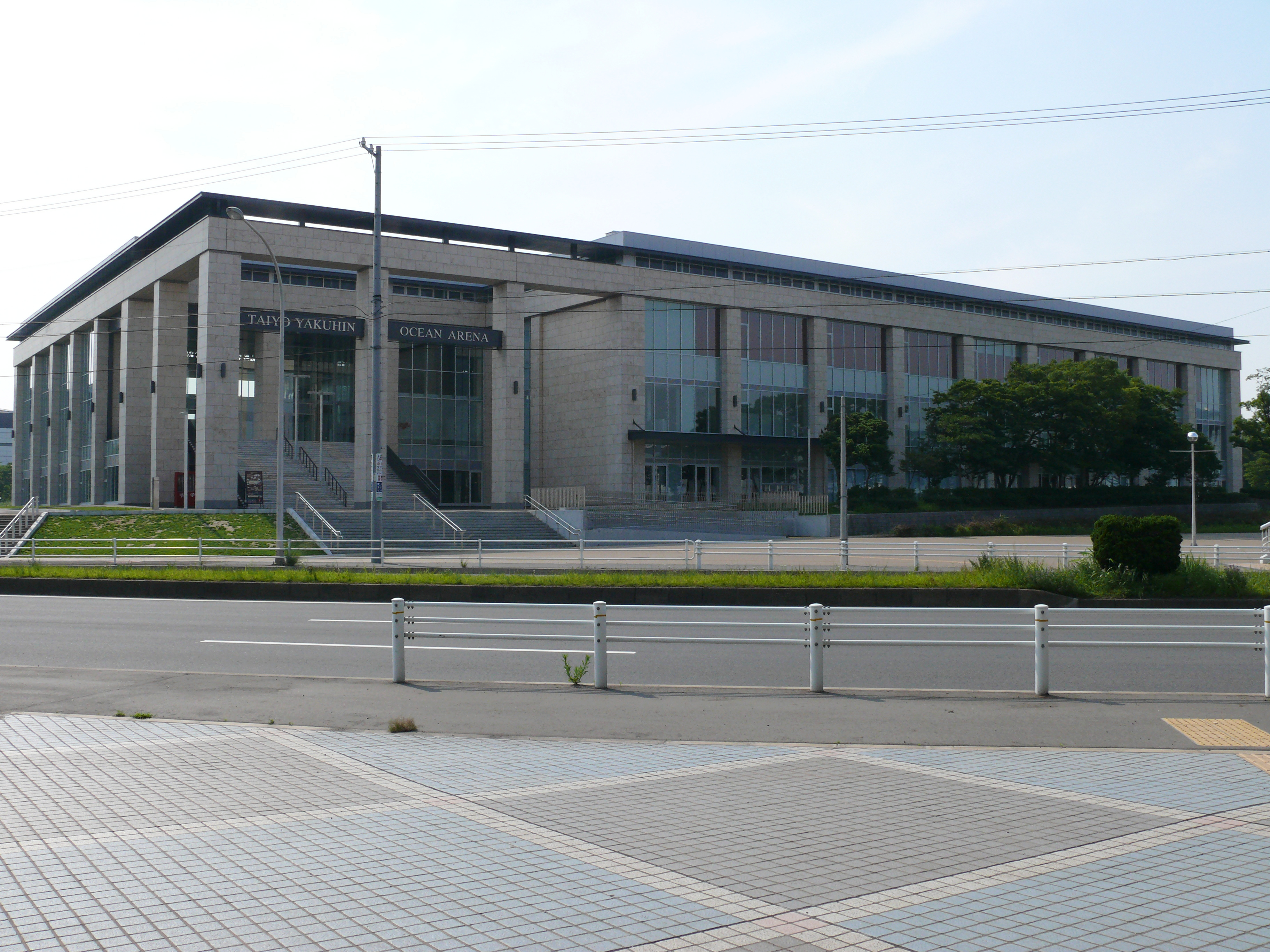 日本のプロフットサルチームの名古屋オーシャンズの本拠地、大洋薬品オーシャンアリーナ。